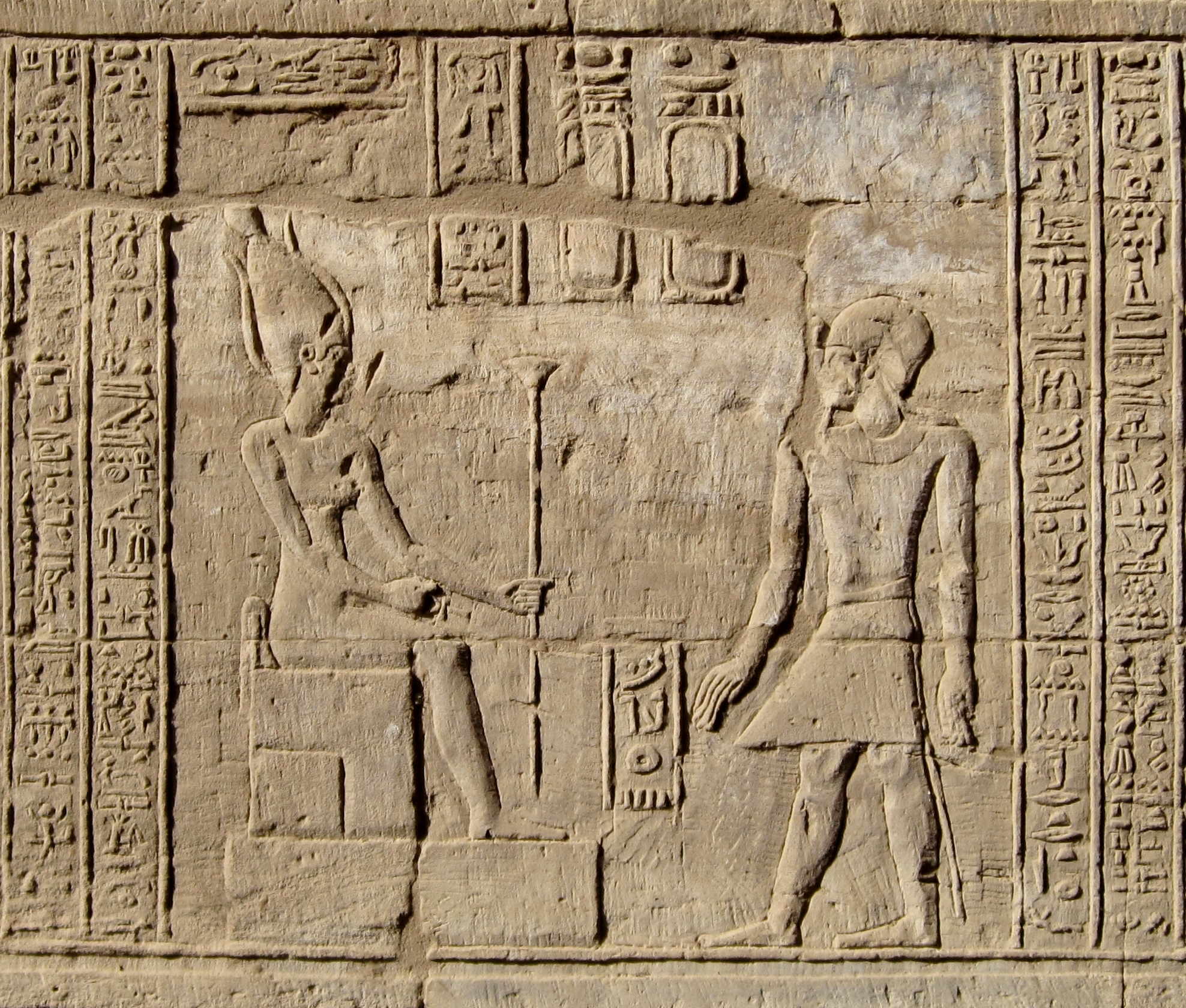 Relief im Innenraum des ptolemäischen Pronaos des Month-Tempels von el-Tod, Ägypten